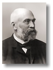 Paul Alfred Stübel